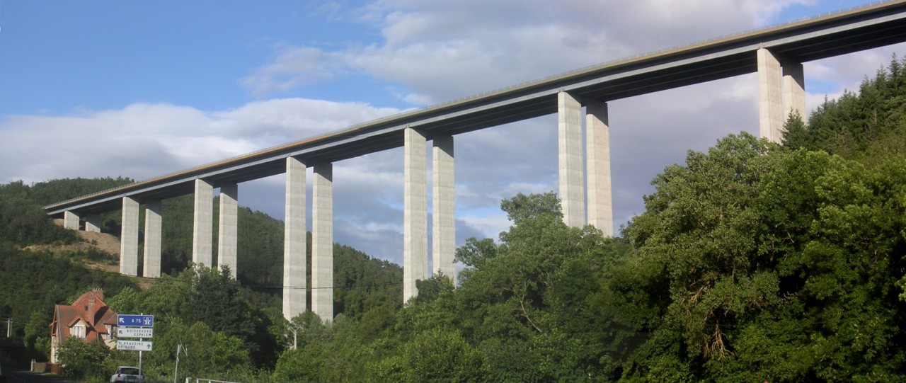 Viaduc de la Violette, Montgon - Grenier-Montgon - 43- France